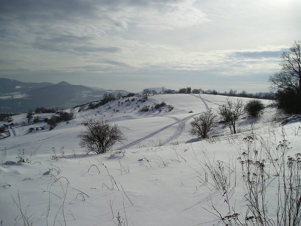 Česky: Pohled na rozhlednu Erbenova vyhlídka v Ústí nad Labem ze severovýchodu.